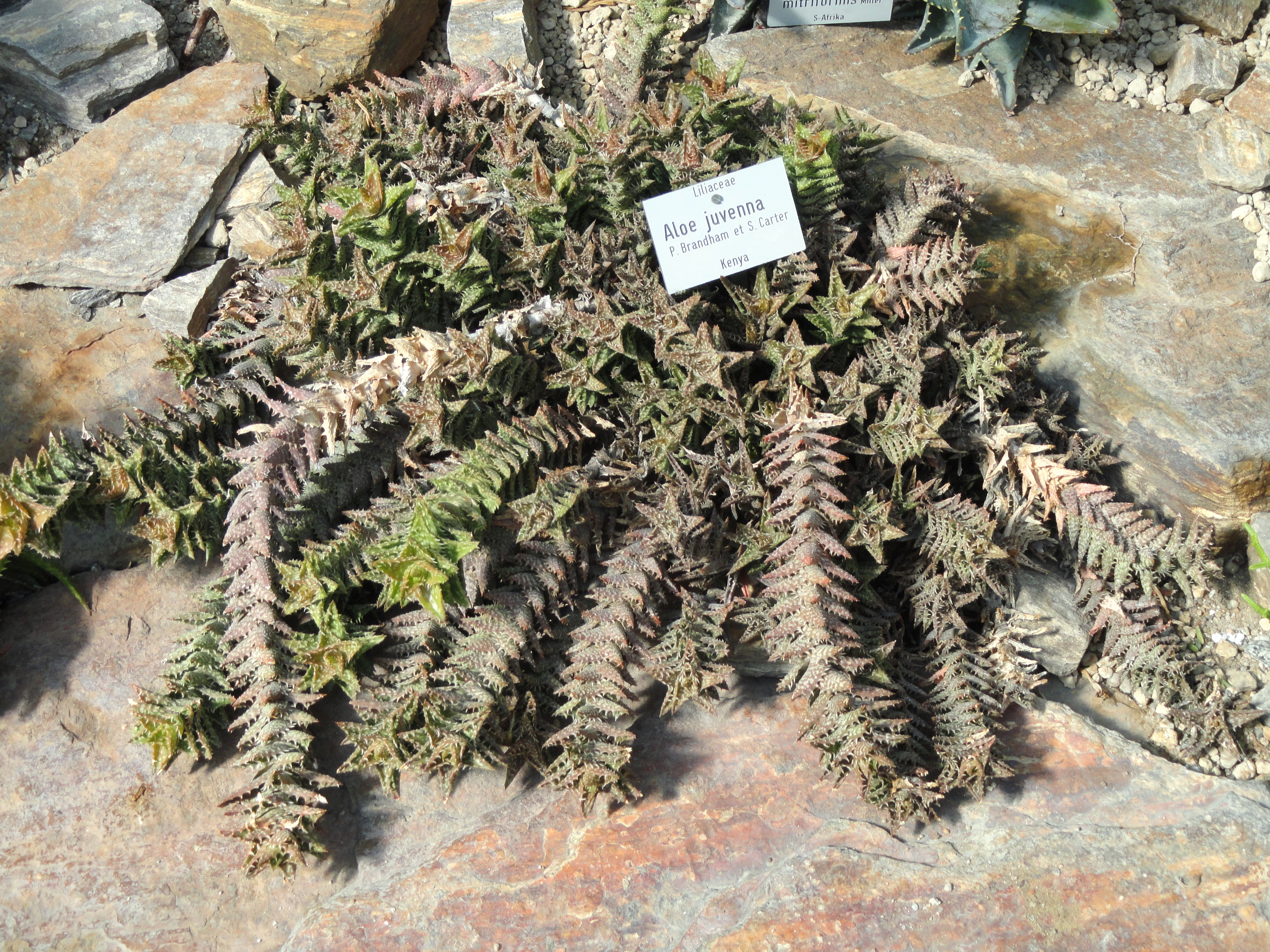 Aloe juvenna specimen in the Botanischer Garten München-Nymphenburg, Munich, Germany.